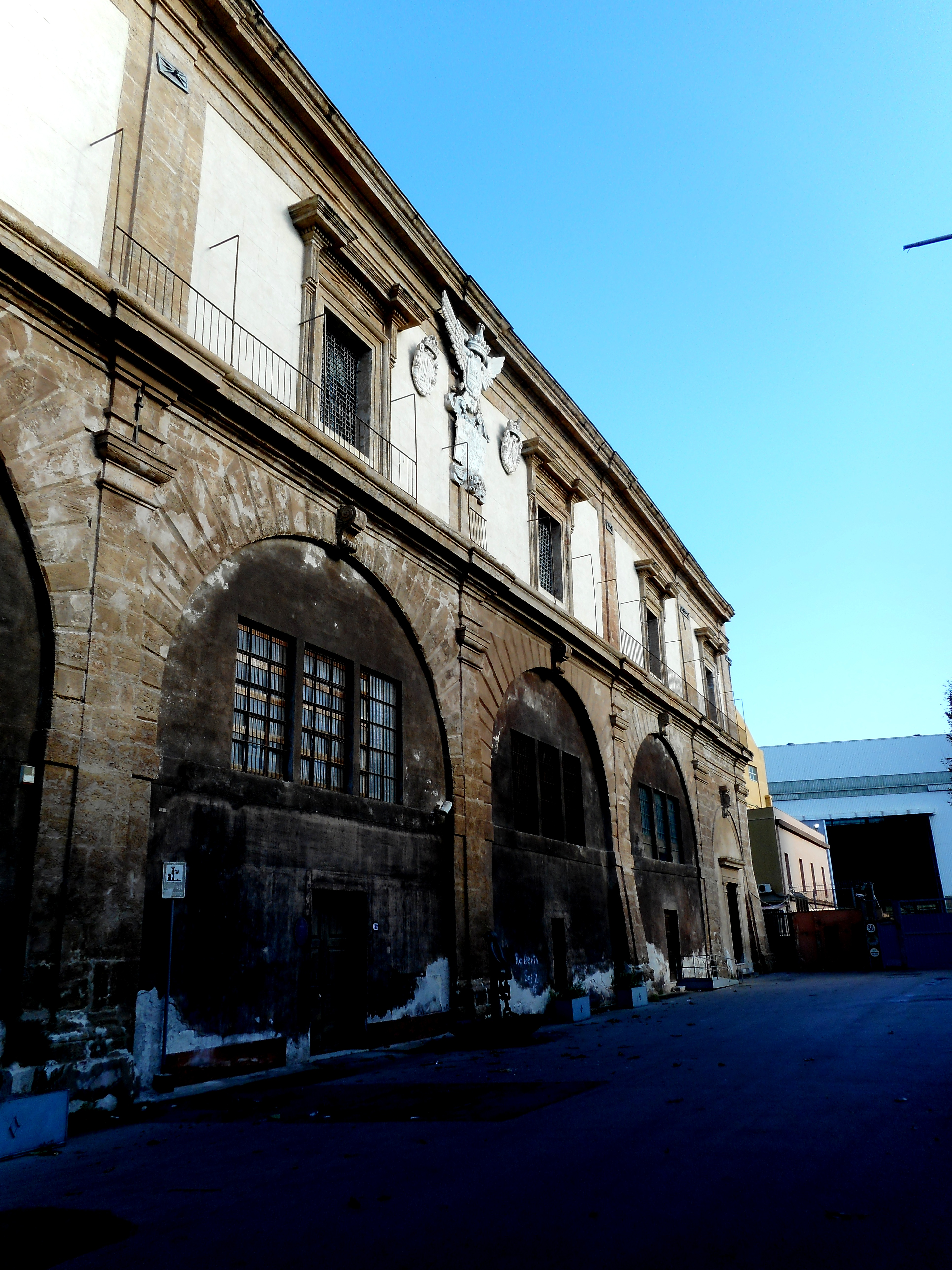 Facciata dell'Arsenale di Palermo